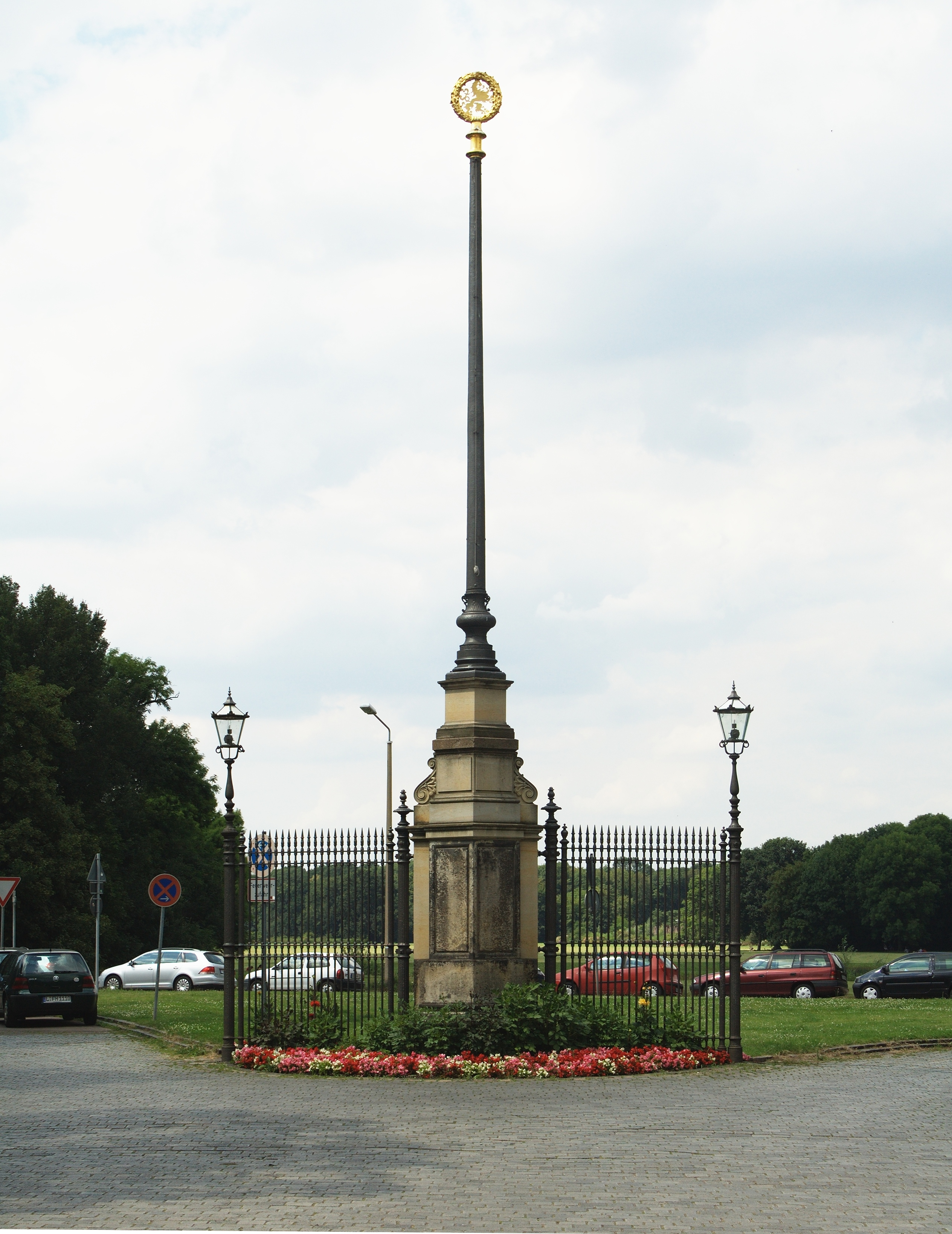 Historischer Eingang zum Rosental in Leipzig